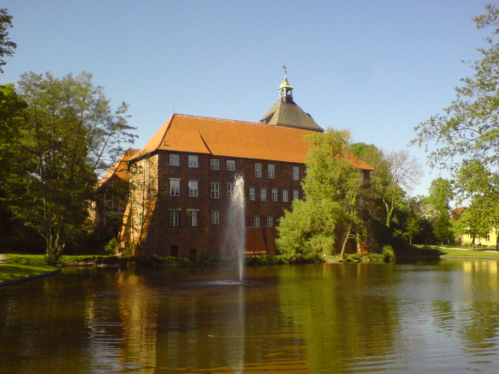 Schloss Winsen Urheber = PodracerHH 20:50, 8. Mai 2007 (CEST) Datum = 05.2007